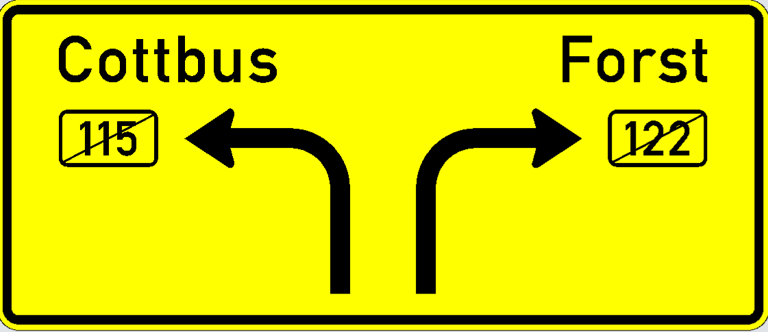 Dieser Wegweiser stand aus Richtung Döbern kommend am Abzweig mit der B122 bei Cottbus